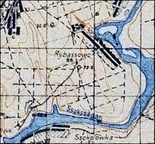 Фрагмент немецкой карты M-36-139-D 1942 года.